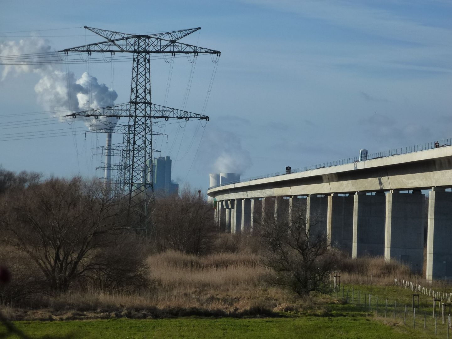 Saale-Elster-Talbrücke mit Blick auf das Kraftwerk Schkopau